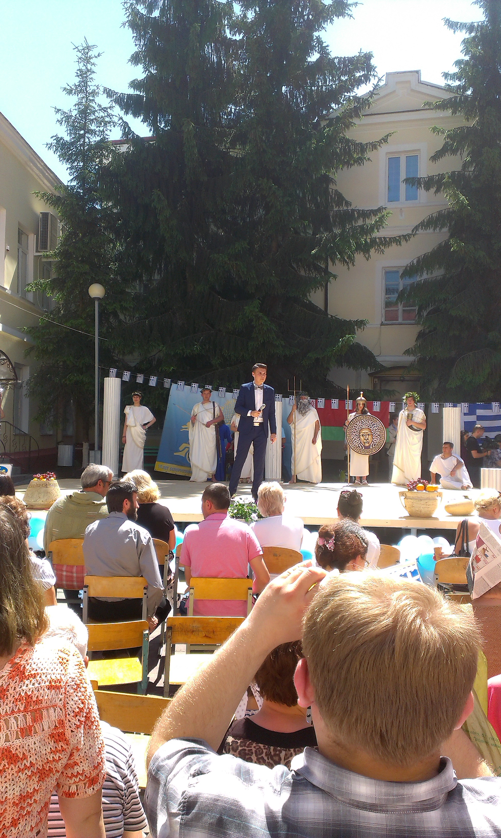 Грэчаскі падворак на X Рэспубліканскім фестывале нацыянальных культур